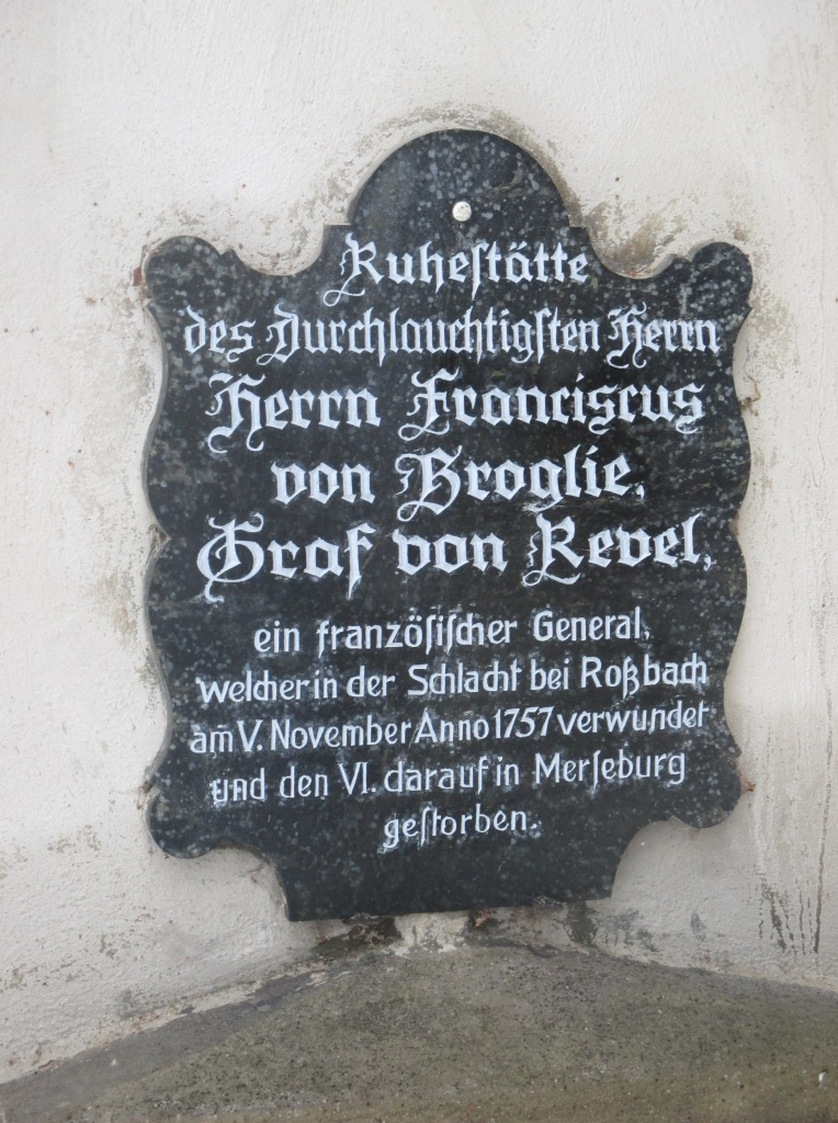 Merseburg, Stadtfriedhof St. Maximi, Grabmal des Generals François de Broglie-Revel